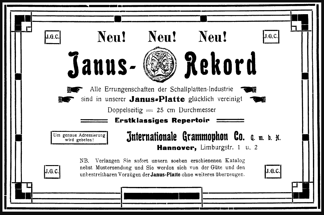 Zeitungsanzeige der Firma Internationale Grammophon Co. G.m.b.H. mit Sitz in Hannover, Limburgstraße 1 und 2, mit Vorstellung ihrer neu herausgebrachten doppelseitigen Schallplatte der Marke Janus-Rekord. Laut einer Ende 1907 erschienenen Ausgabe der Phonographischen Zeitschrift hatte die Deutsche Grammophon Gesellschaft erfolgreich gegen die Verwendung des Namesbestandteils "Grammophon" bei der anfangs in der Limburgstraße 1 und 2 sitzenden hannoverschen Firma geklagt, die daraufhin wohl noch im selben Jahr ihren Namen änderte in Vereinigte Schallplatten-Werke Janus-Minerva ...